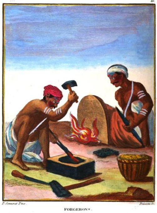 Forgerons indiens